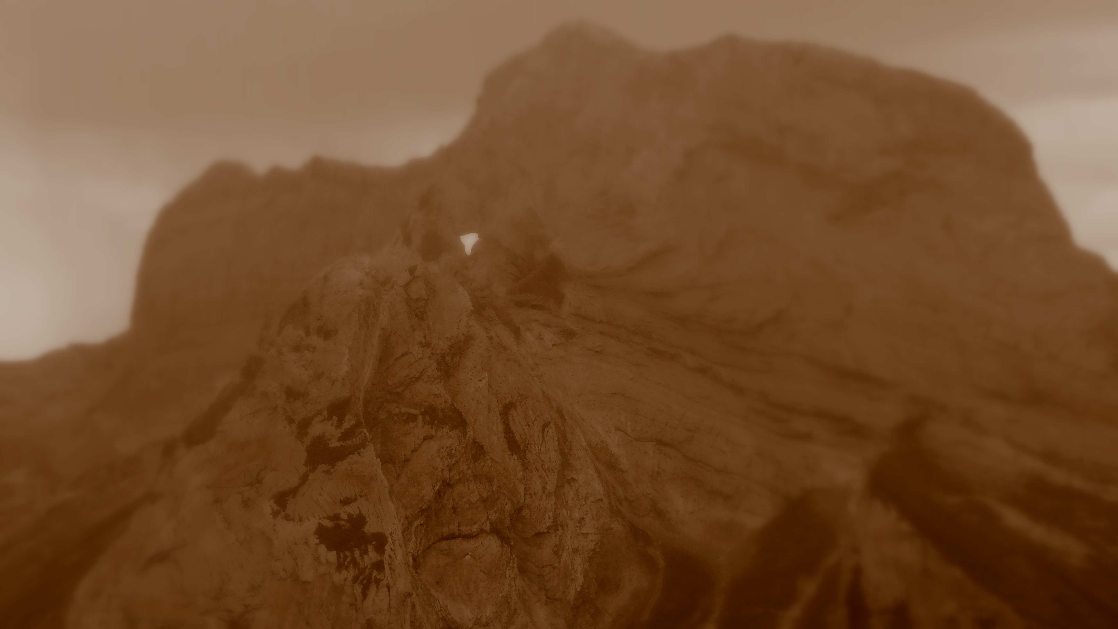 Col d'Aubisque - le visage de la femme au châle et lèvres gercées